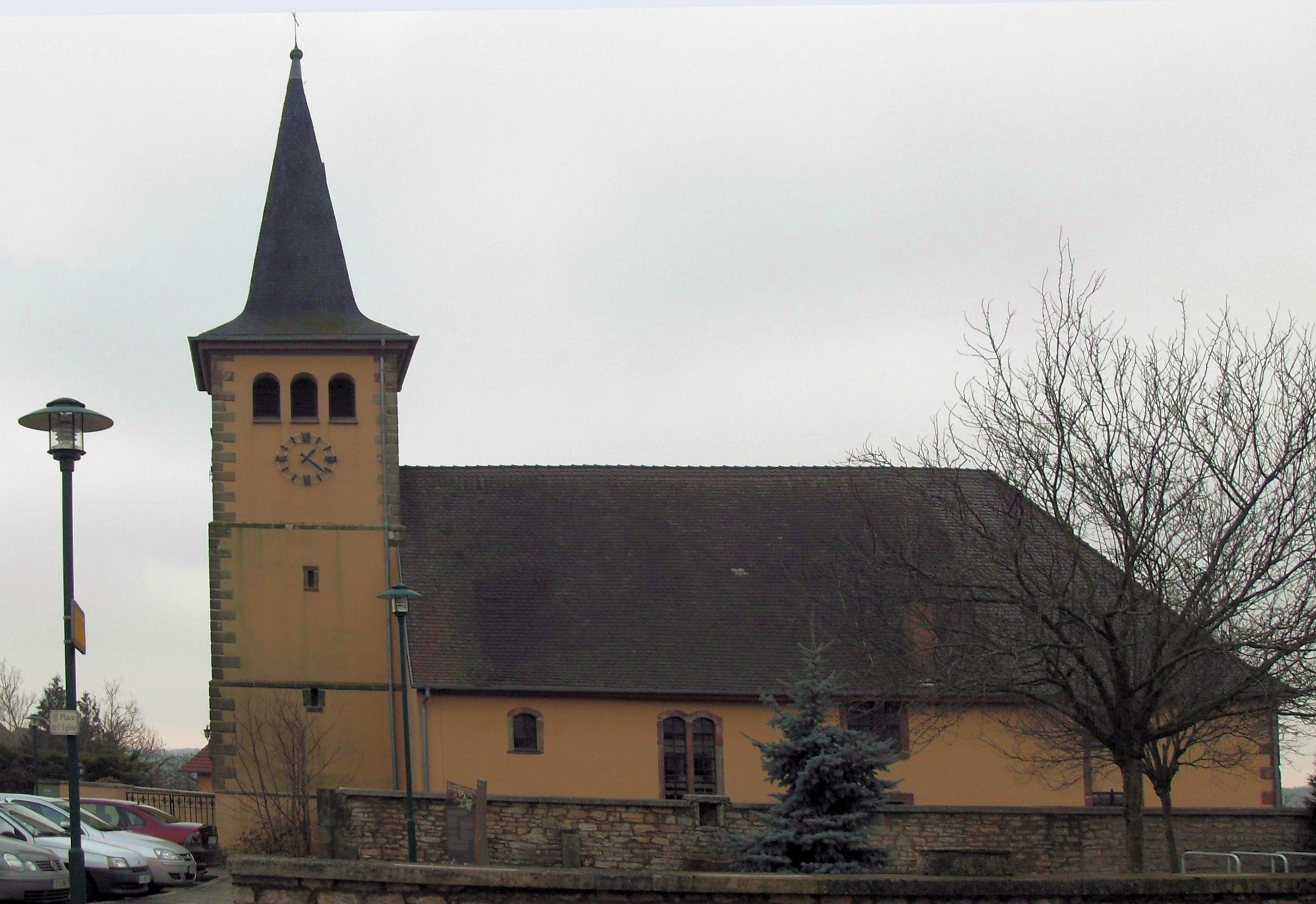 L'église reformée à Rauwiller